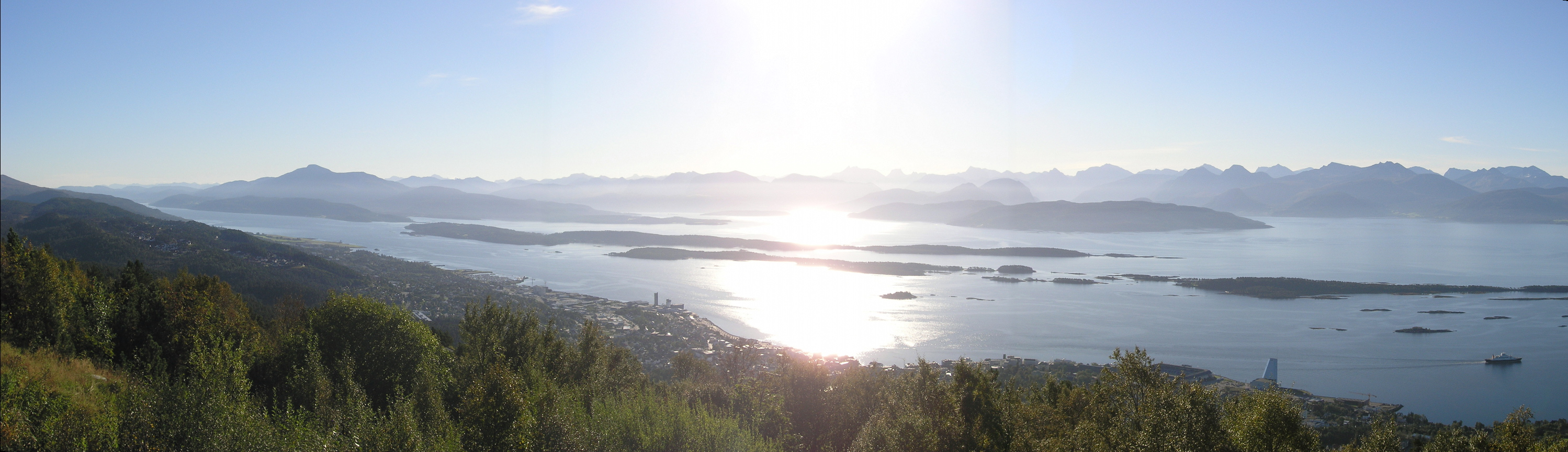 Blick vom Aussichtspunkt Varden über Molde südwärts